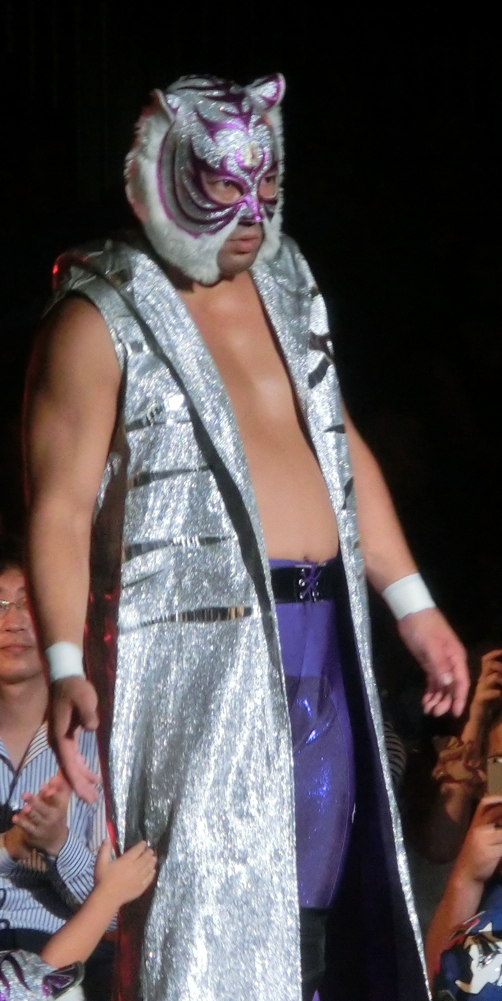 2代目スーパータイガー